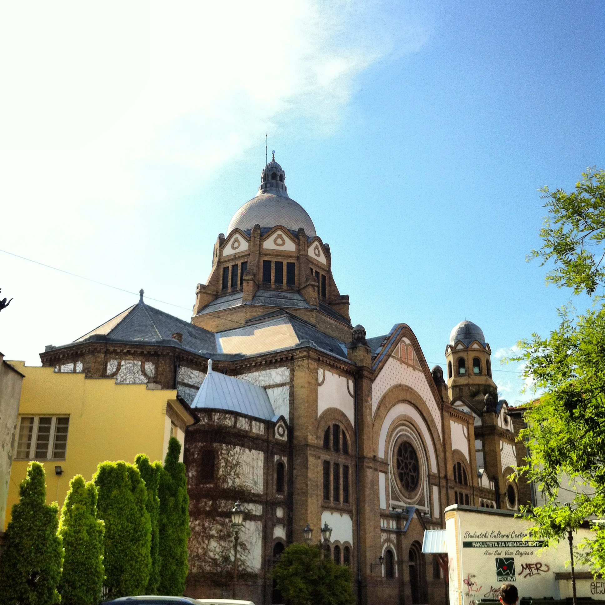 Српски (ћирилица): Једна је од четири синагоге у Србији. Налази се у Јеврејској улици у Новом Саду. Саграђена је у периоду од 1906-9 године.